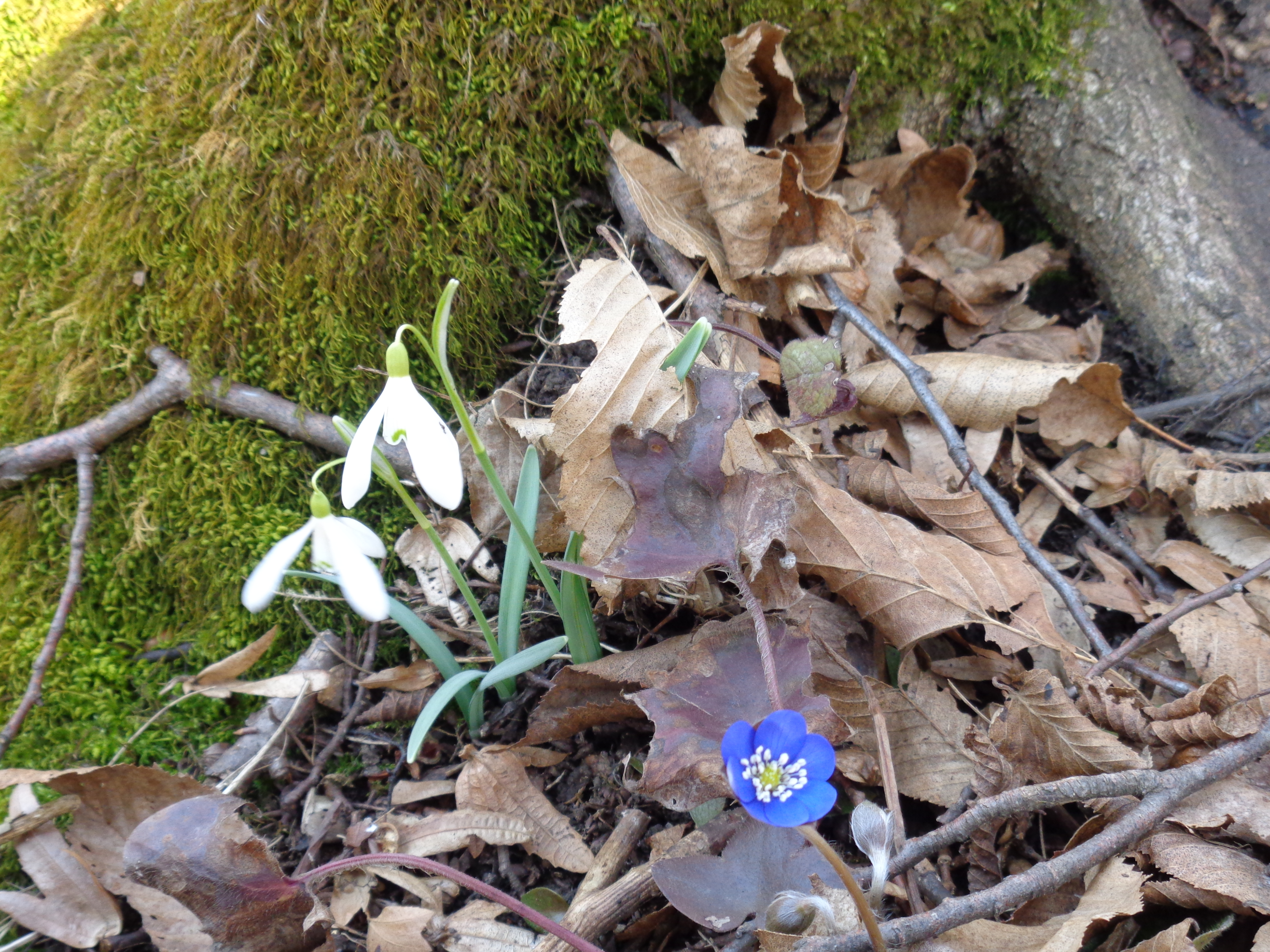 Підсніжник і печіночниця в лісі міста Монастириська